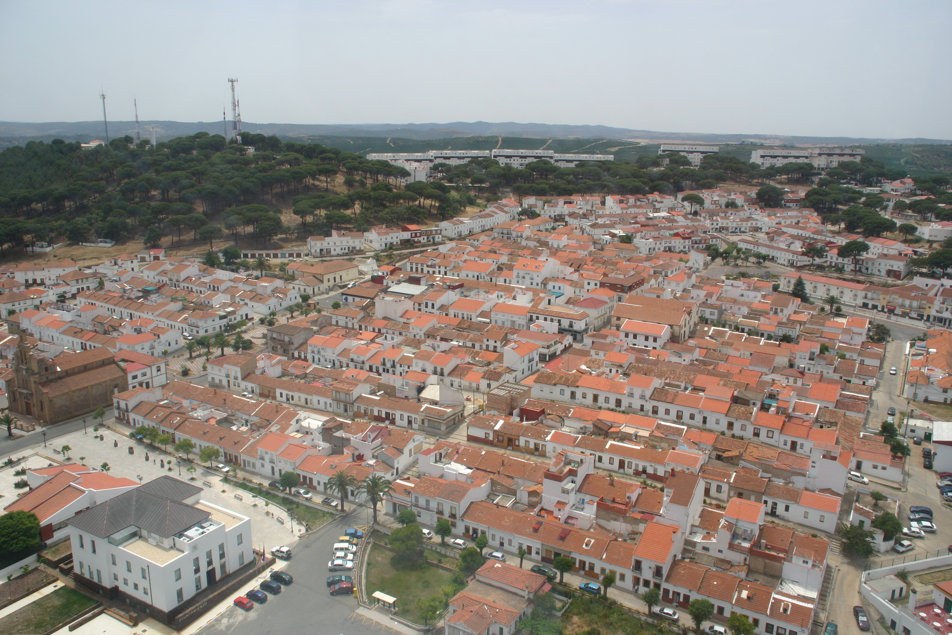 riotinto desde el cielo